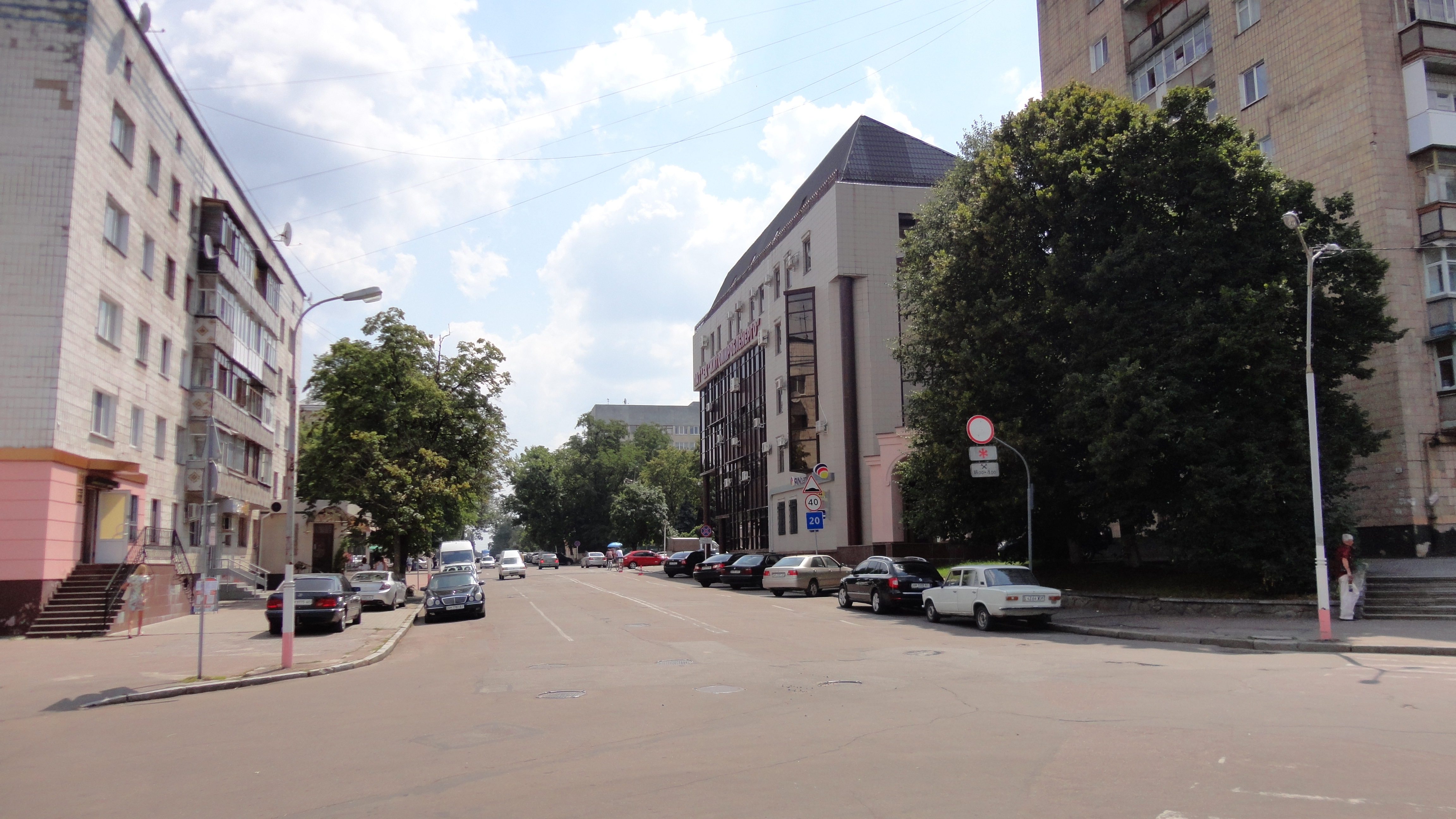 Пушкінська вулиця, Житомир